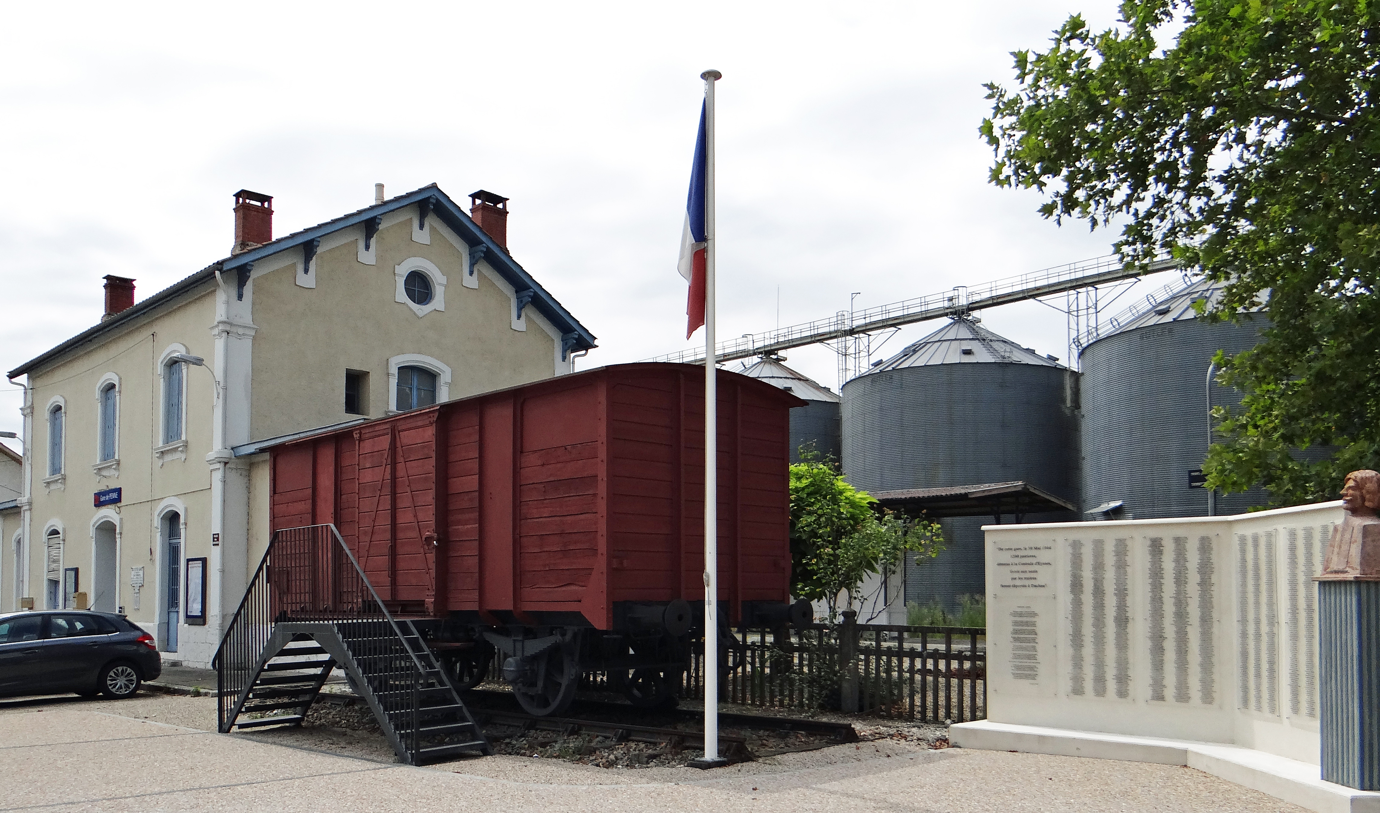 Penne-d'Agenais - Gare de Penne - Mémorial des déportés de la prison d'Eysses : la gare de Penne, le wagon du souvenir, le mémorial donnant les noms des 1200 déportés et le buste de Jean Ferrat